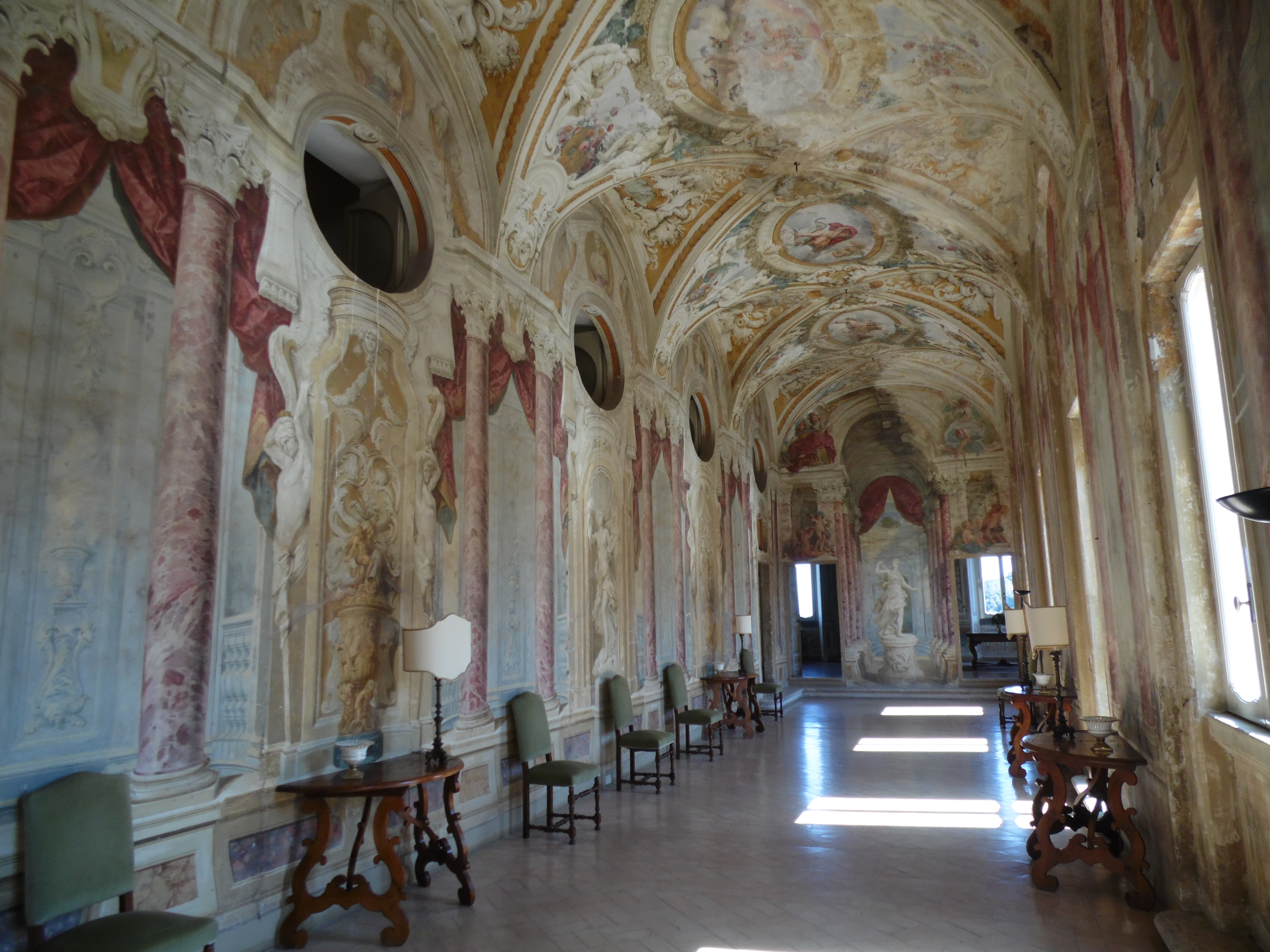 Die ländliche Villa Grazioli ist eine denkmalgeschützte Villa mit Garten in dem Ort Grottaferrata, Region Latium nahe Rom in Italien. Sie ist ein Bauwerk der Renaissance und wurde um 1580 von Kardinal Antonio Carafa errichtet.